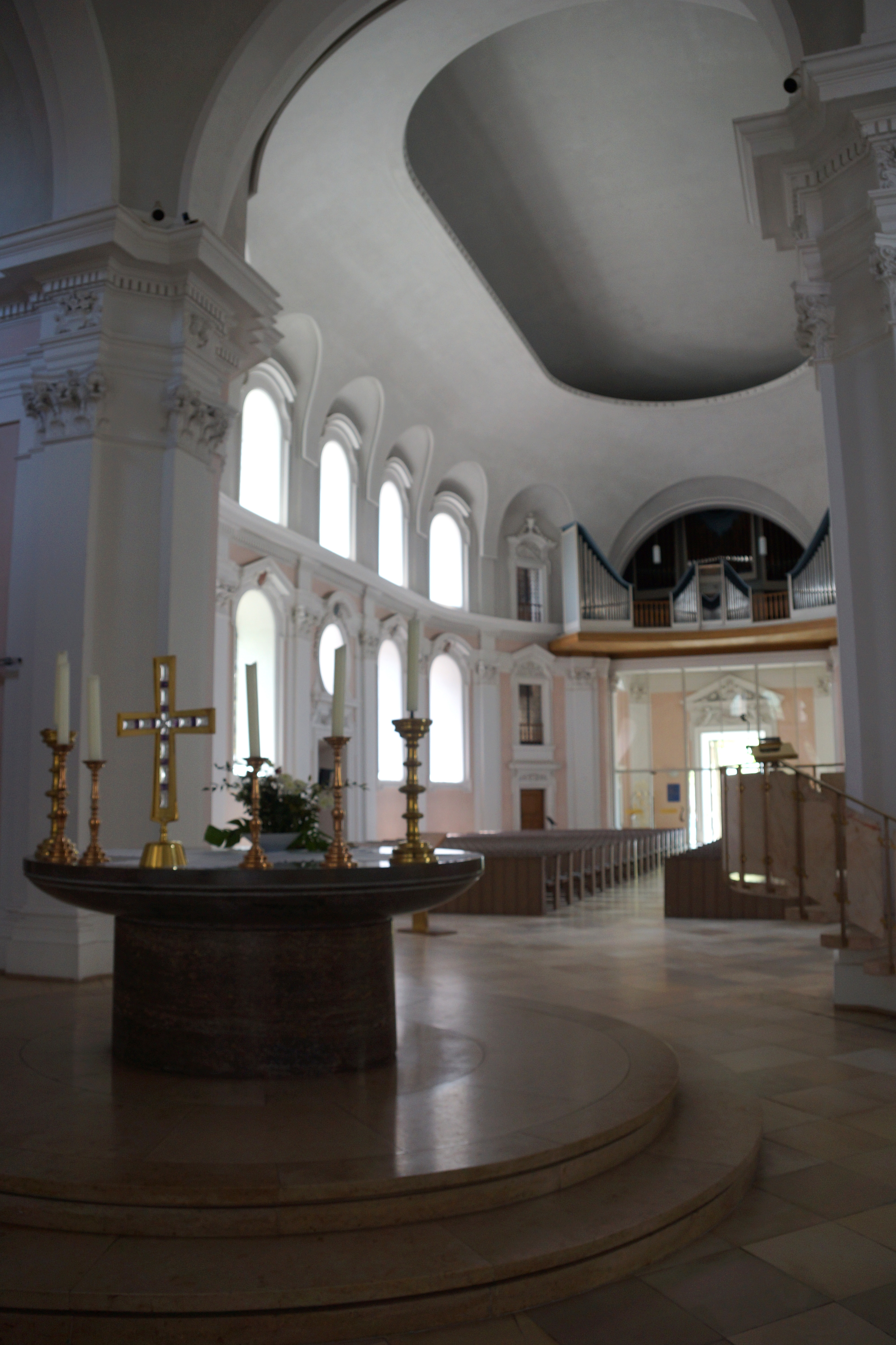 St. Egidien / Egidienkirche in Nürnberg